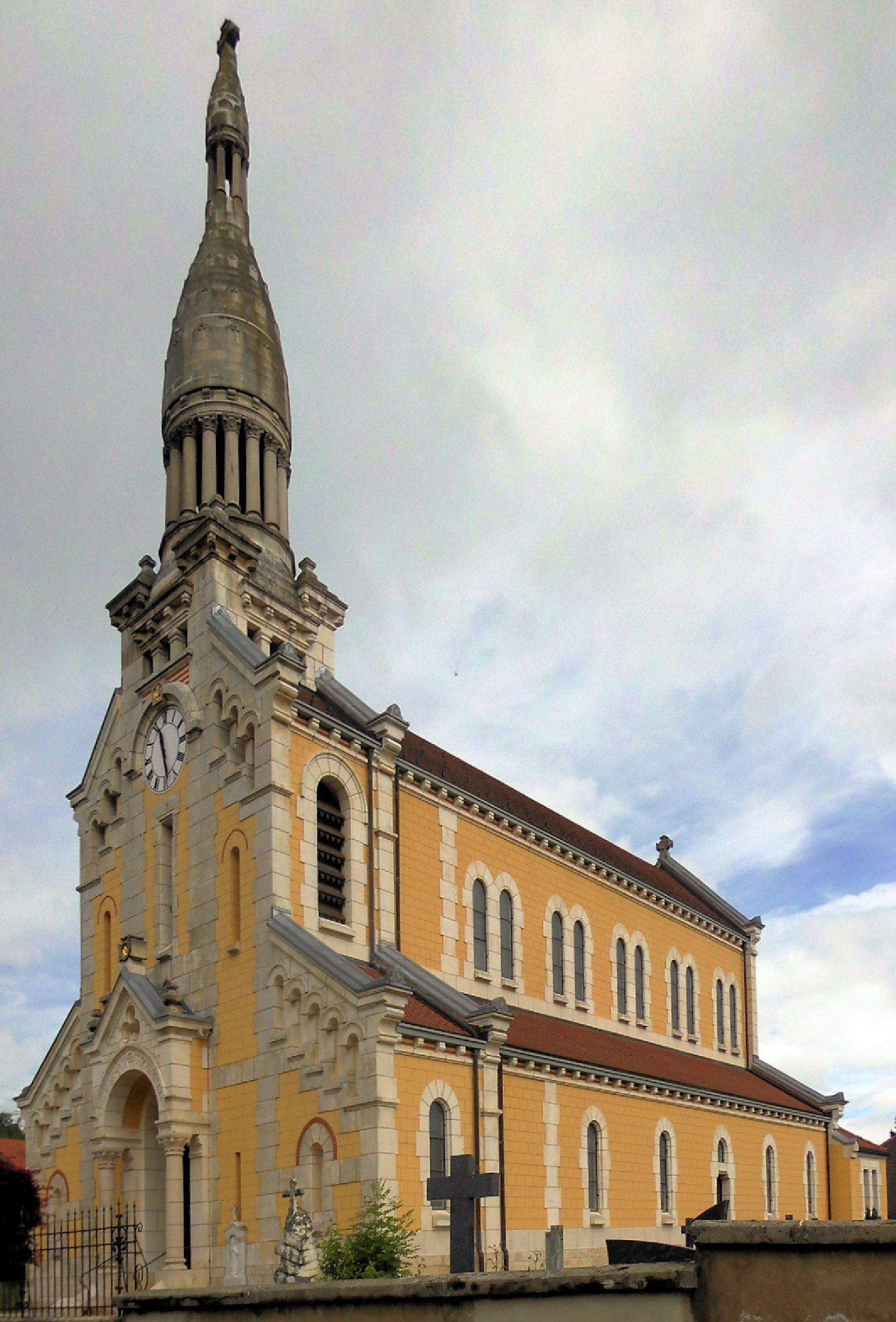 L'église Saint-Étienne de Bressaucourt, Suisse